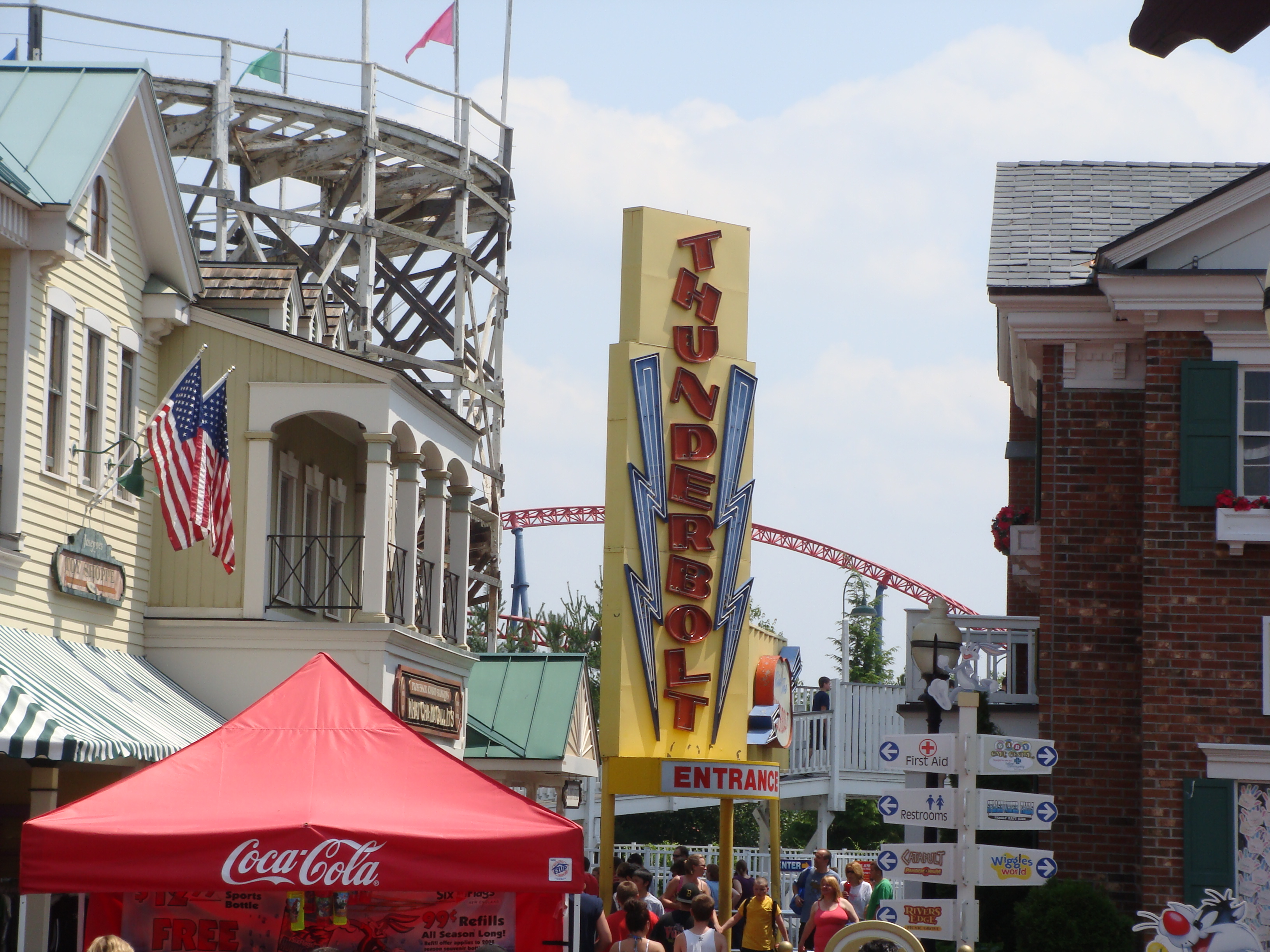 Thunderbolt Entrance